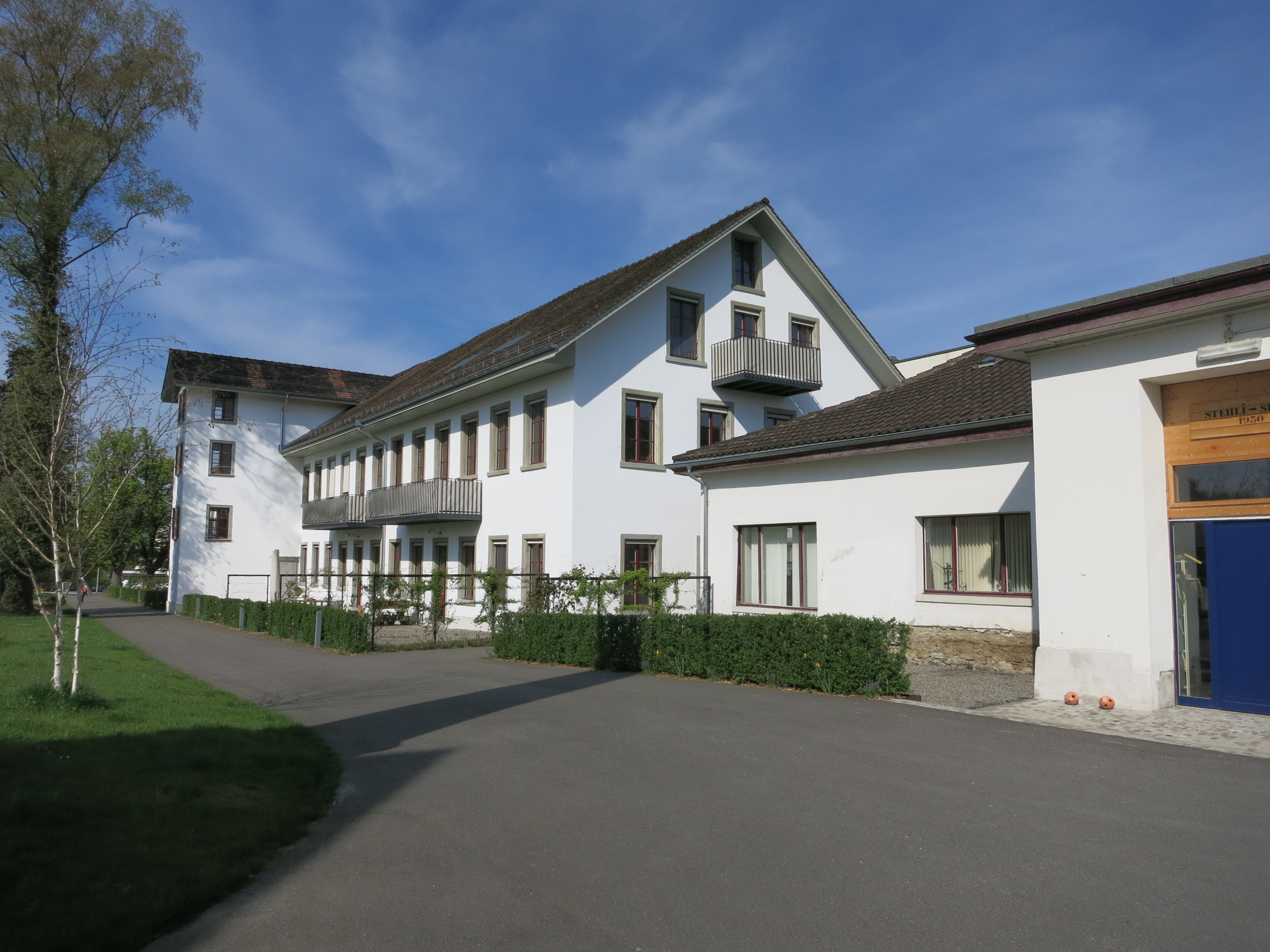 ehemalige Seidenweberei, Obfelden ZH, Schweiz